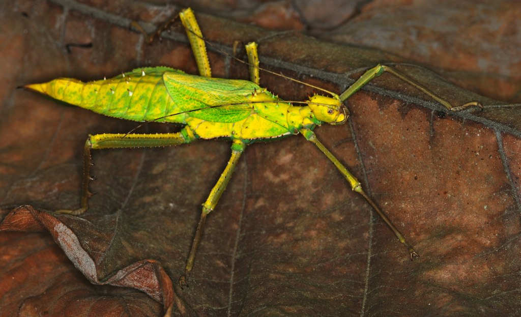 Tapah Hills, Perak, MALAYSIA